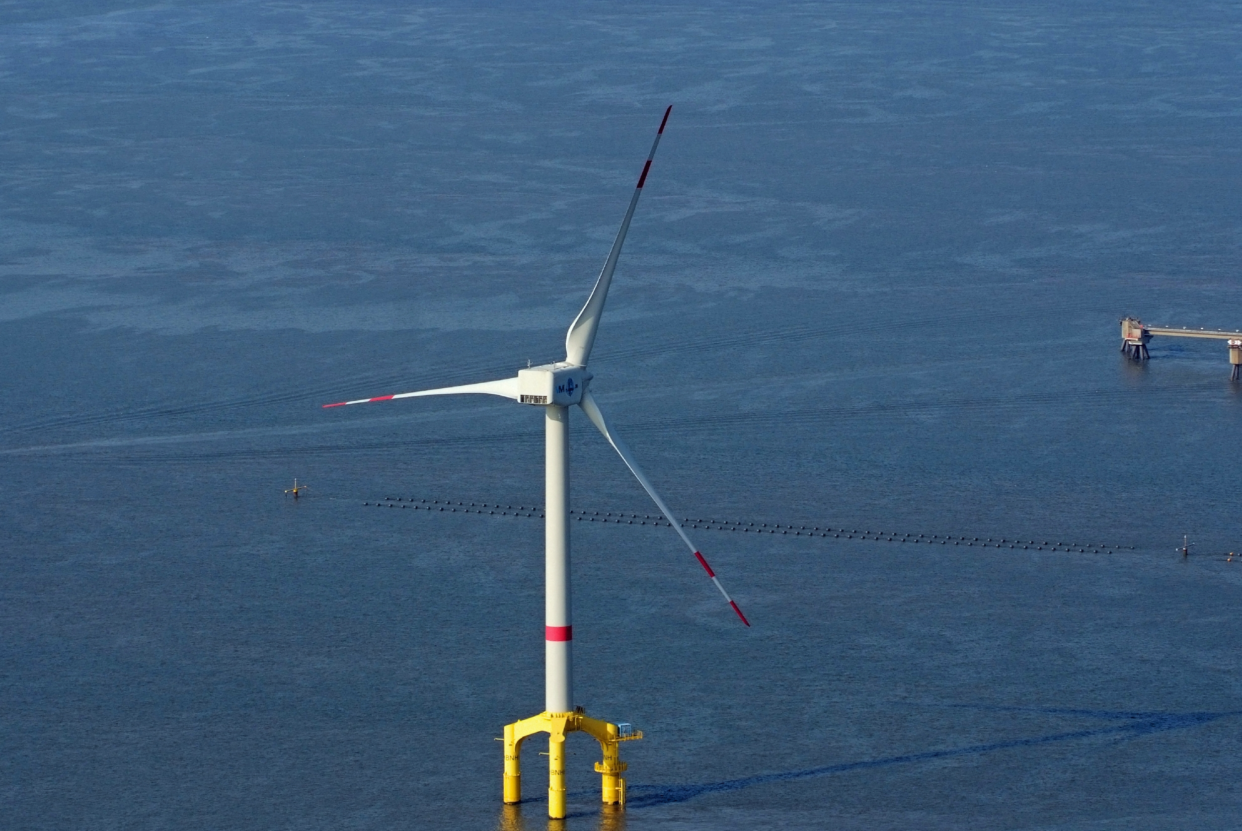 Offshore-Windkraftanlage bei Hooksiel / Fotoflug von Nordholz-Spieka nach Oldenburg und Papenburg